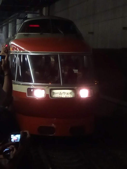 LSE最終運用のホームウェイ83号。 2018年7月10日、相模大野駅にて